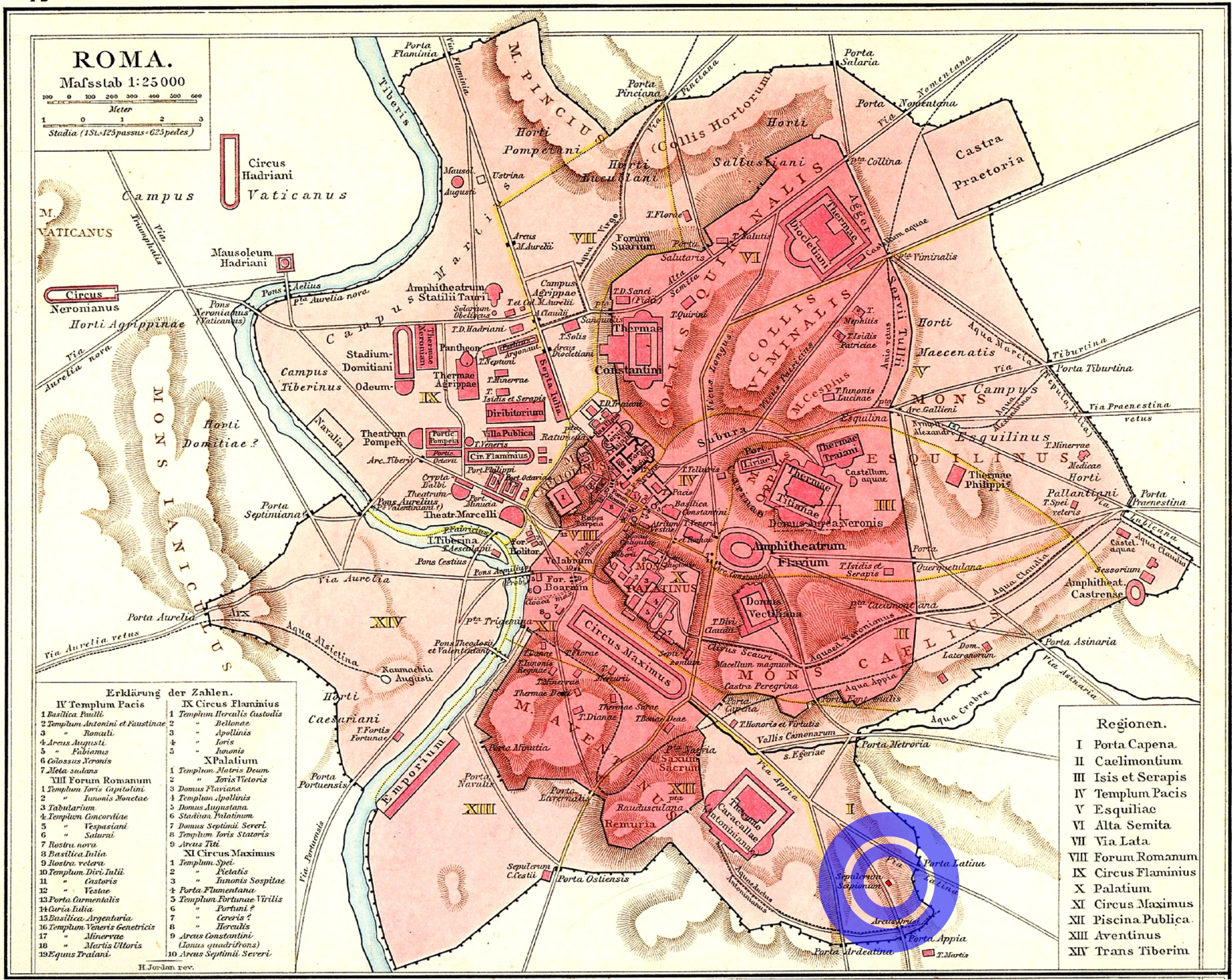 Plan Roms im Altertum mit der Lage des Scipionengrabs im Süden